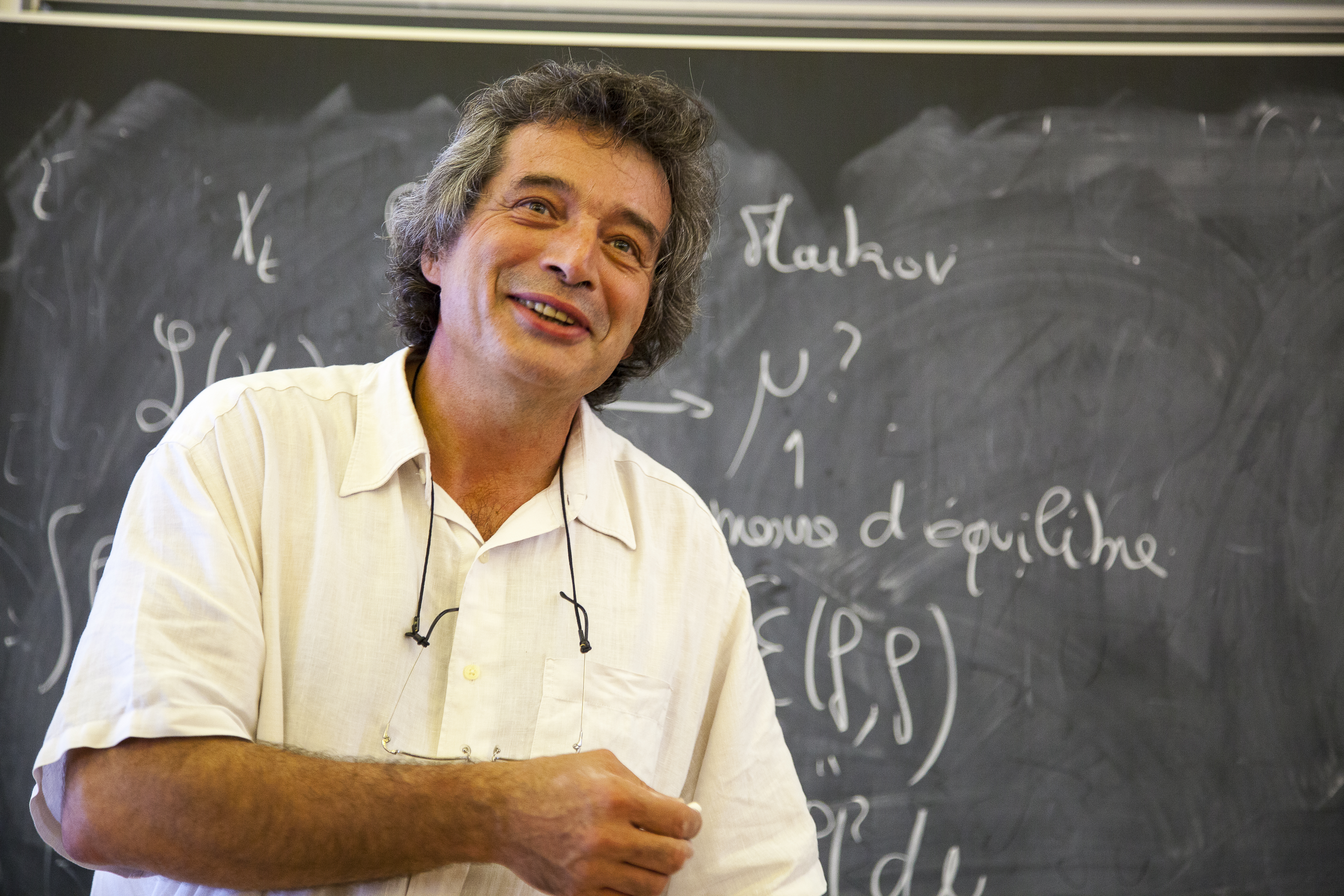 Photo prise en 2009 à Toulouse